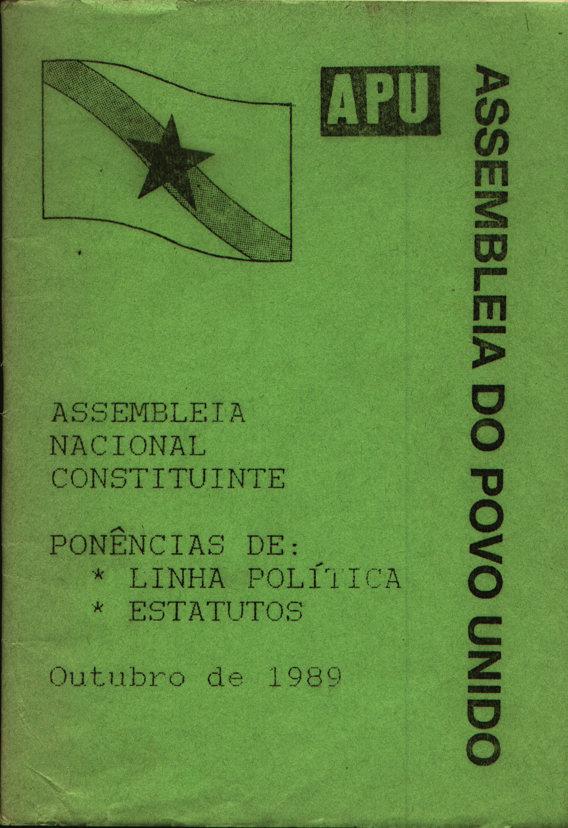 capa de caderno de distribuição livre, sem direitos de autor.